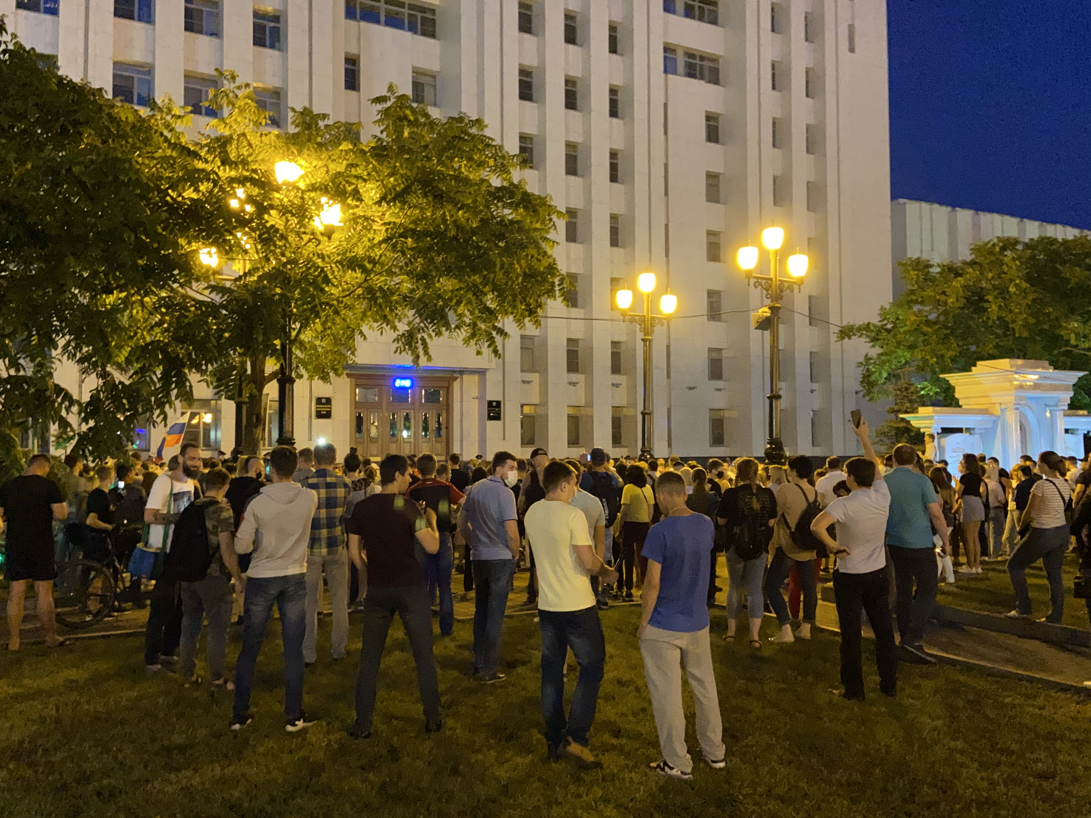 Протестующие в Хабаровске собрались у здания Правительства края требовать освобождение губернатора